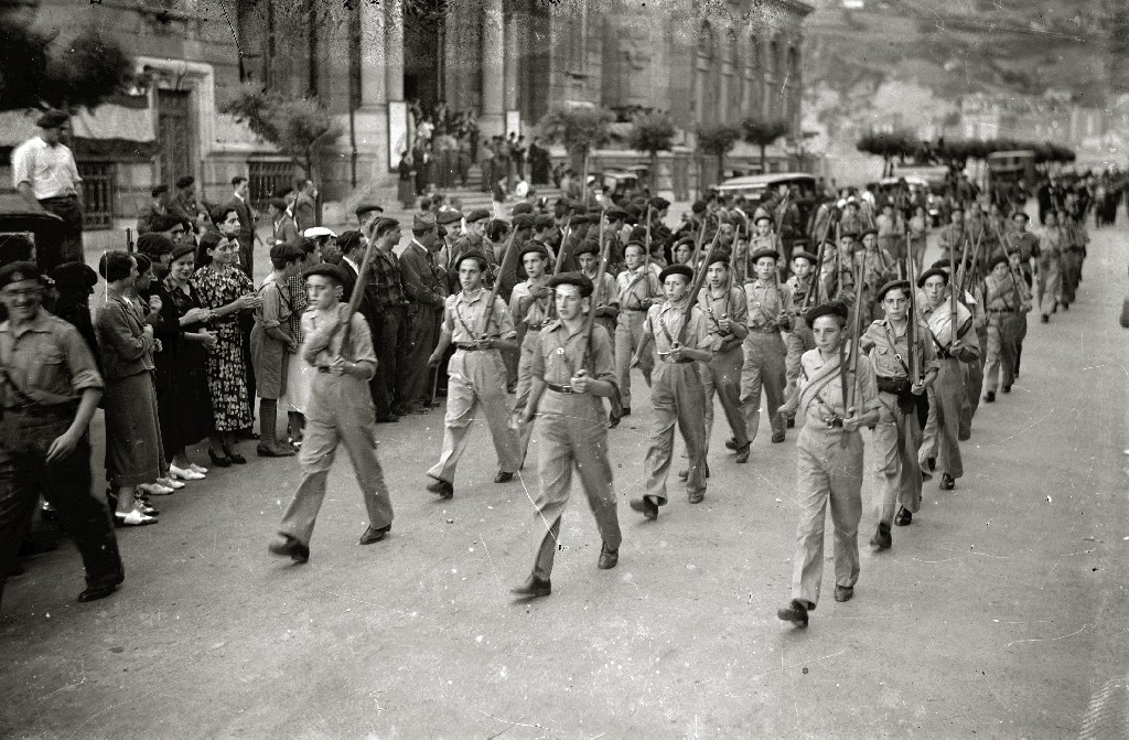 Título original: Entrada de las tropas nacionales en San Sebastián (32/54) Localización: San Sebastián (Guipúzcoa)